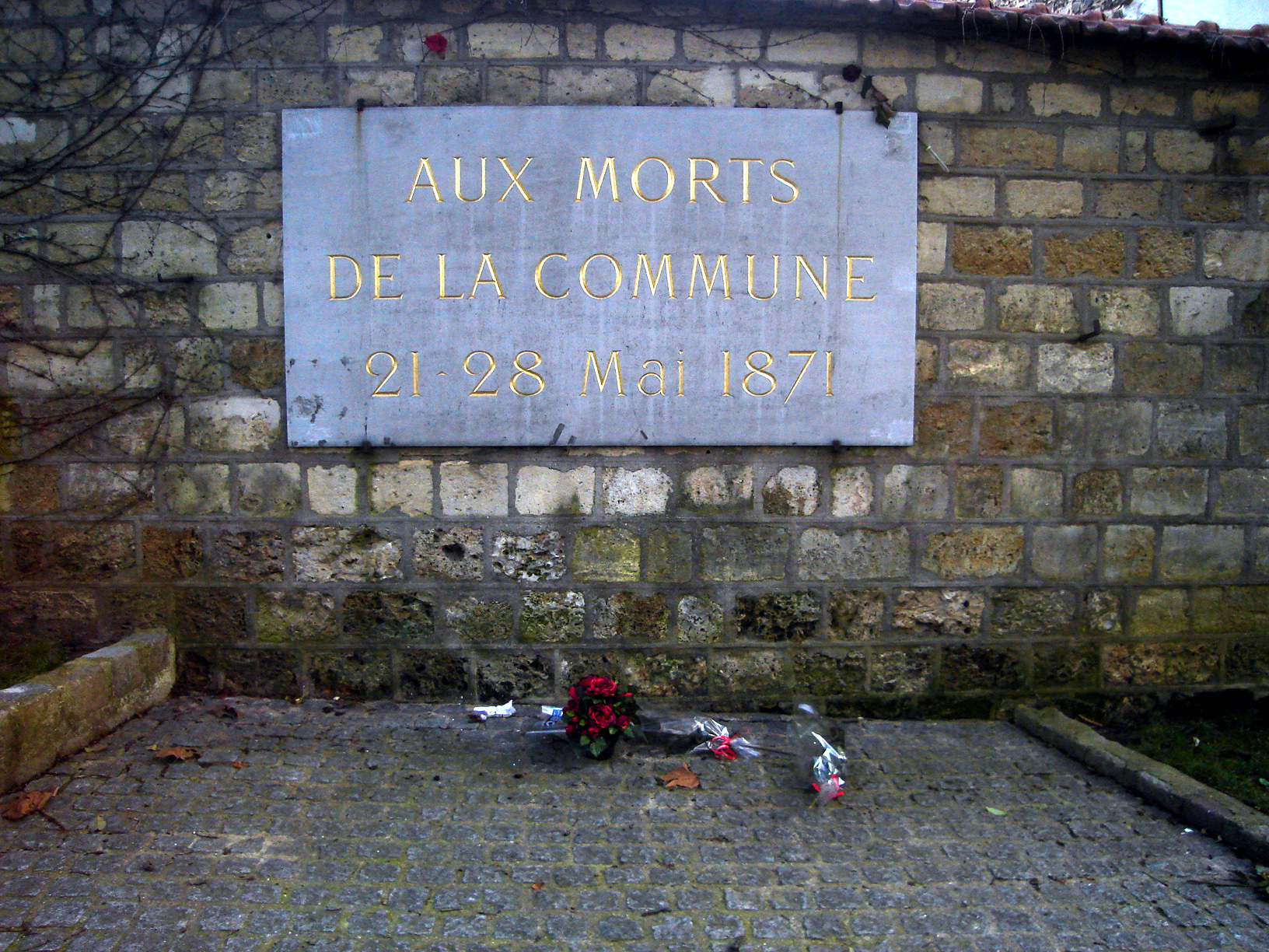 Mur des Fédérés, Père Lachaise Cemetery, Paris, France.